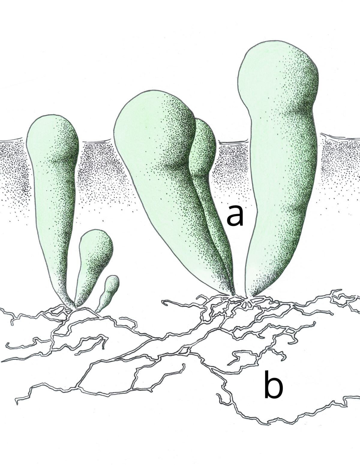 Ilustración de la anatomía de Geosiphon pyriforme. a: vesícula piriforme que contiene al fotobionte. b: micelio del micobionte.